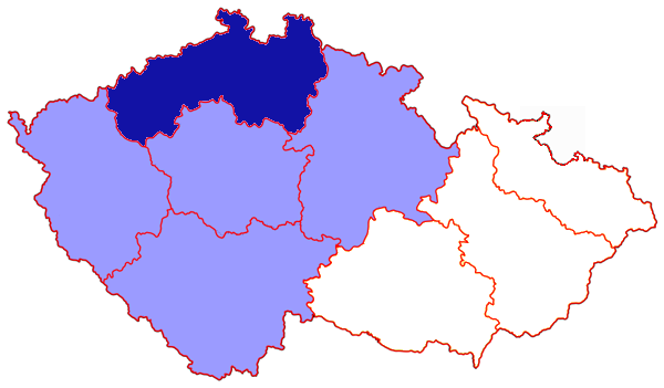 Mappa della diocesi cattolica di Litomerice, nella Repubblica Ceca. Lavoro personale.